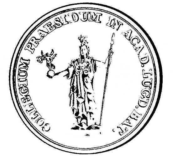 Sigillum Maior Collegium Praesidium in Academiae Lugduno Batavae